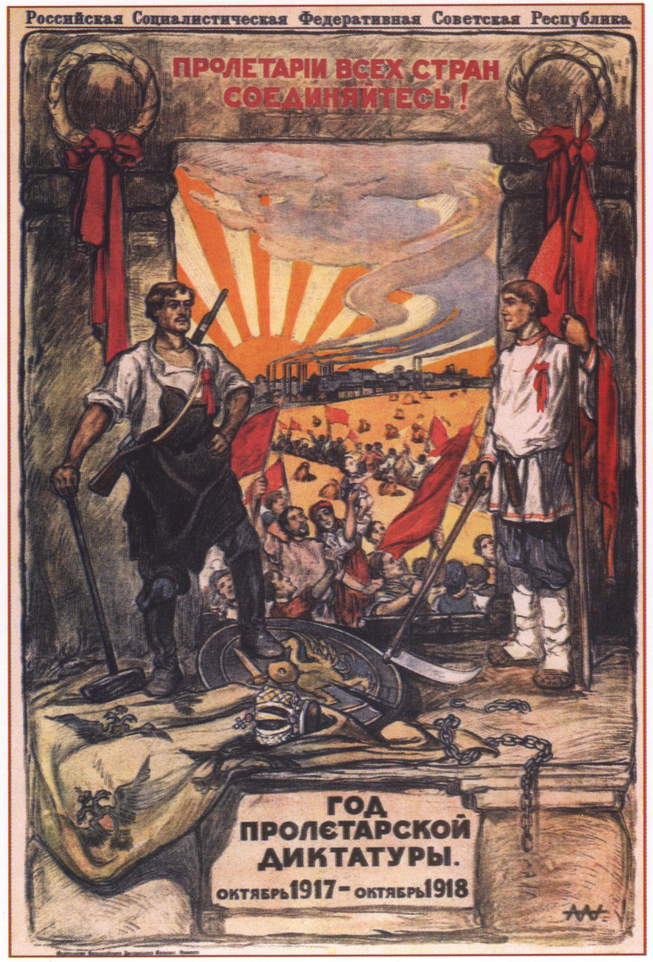 Text in Englishː Dictatorship of the Proletariat Year: October 1917 - October 1918